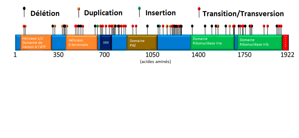 Résumé des mutations pathogéniques connues chez le gène DICER1 pour le syndrome DICER1.